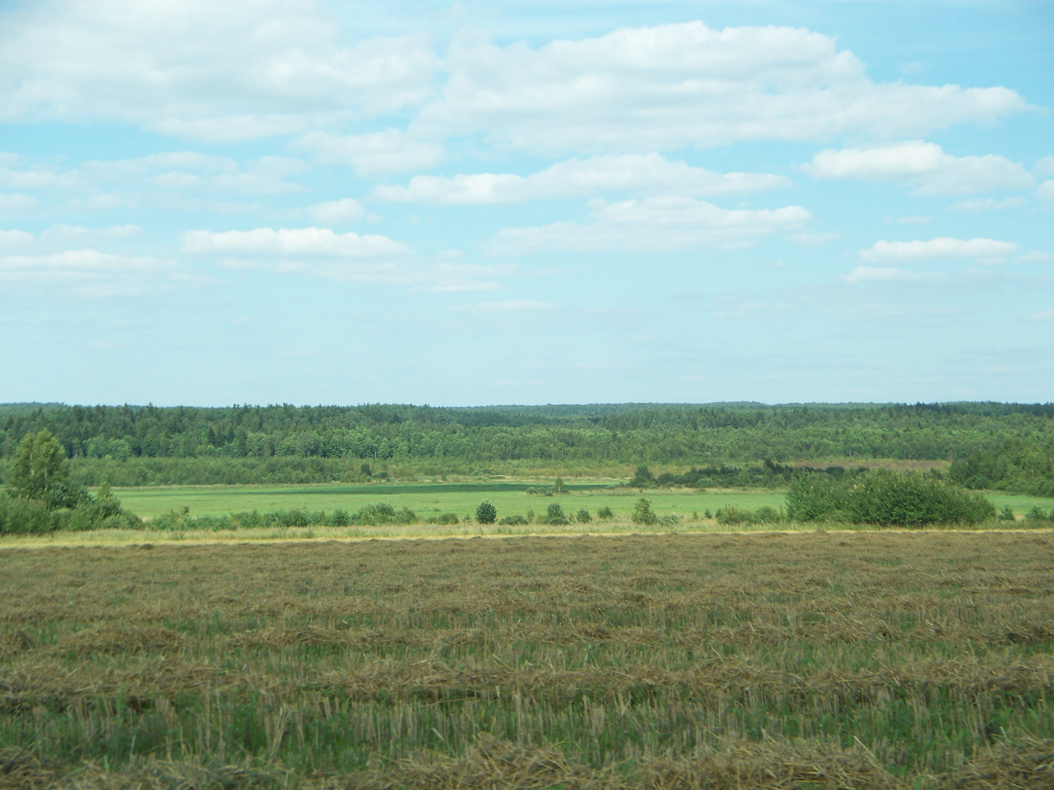 уборка